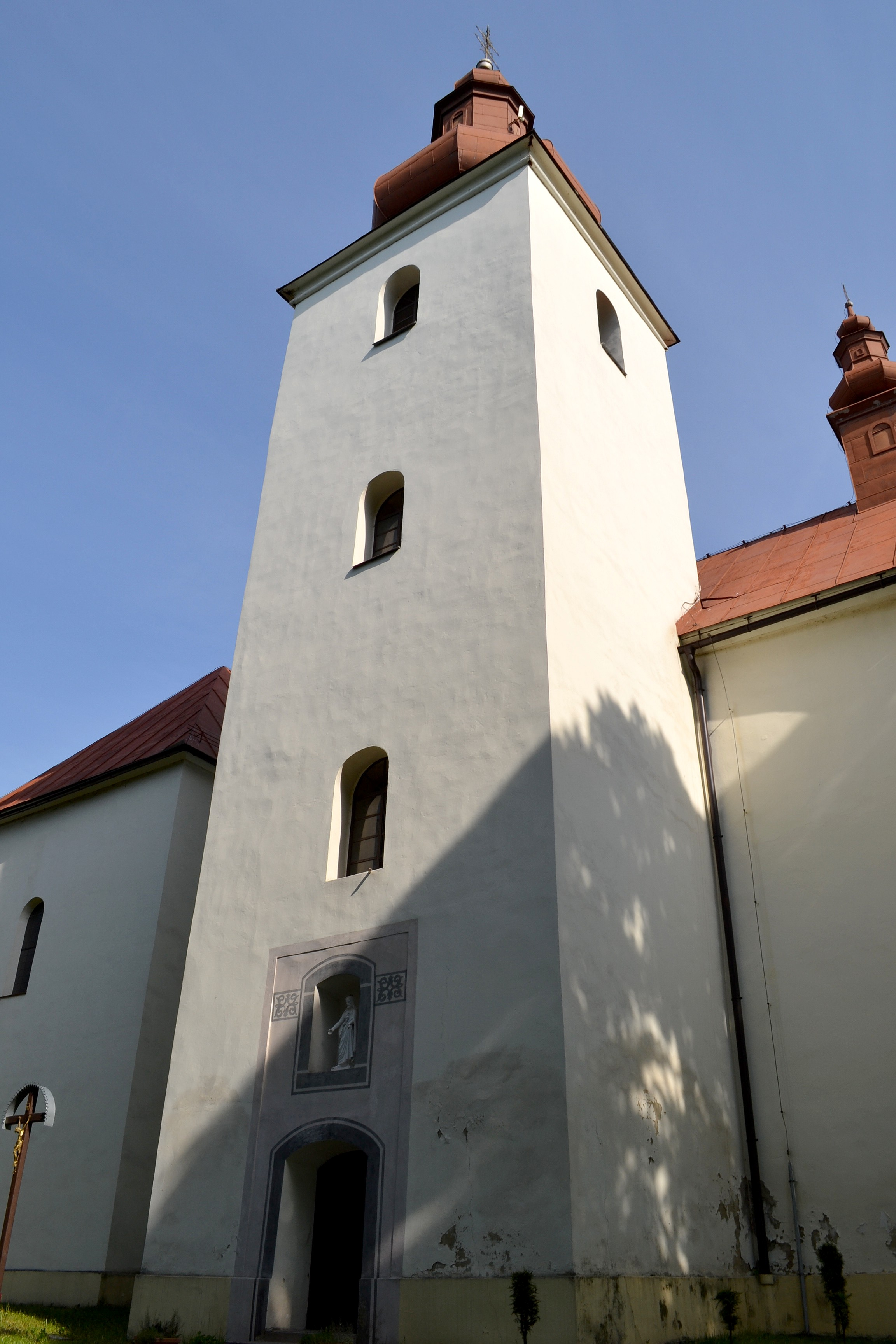 Tŕnie (okr. Zvolen), Kostol svätého Martina